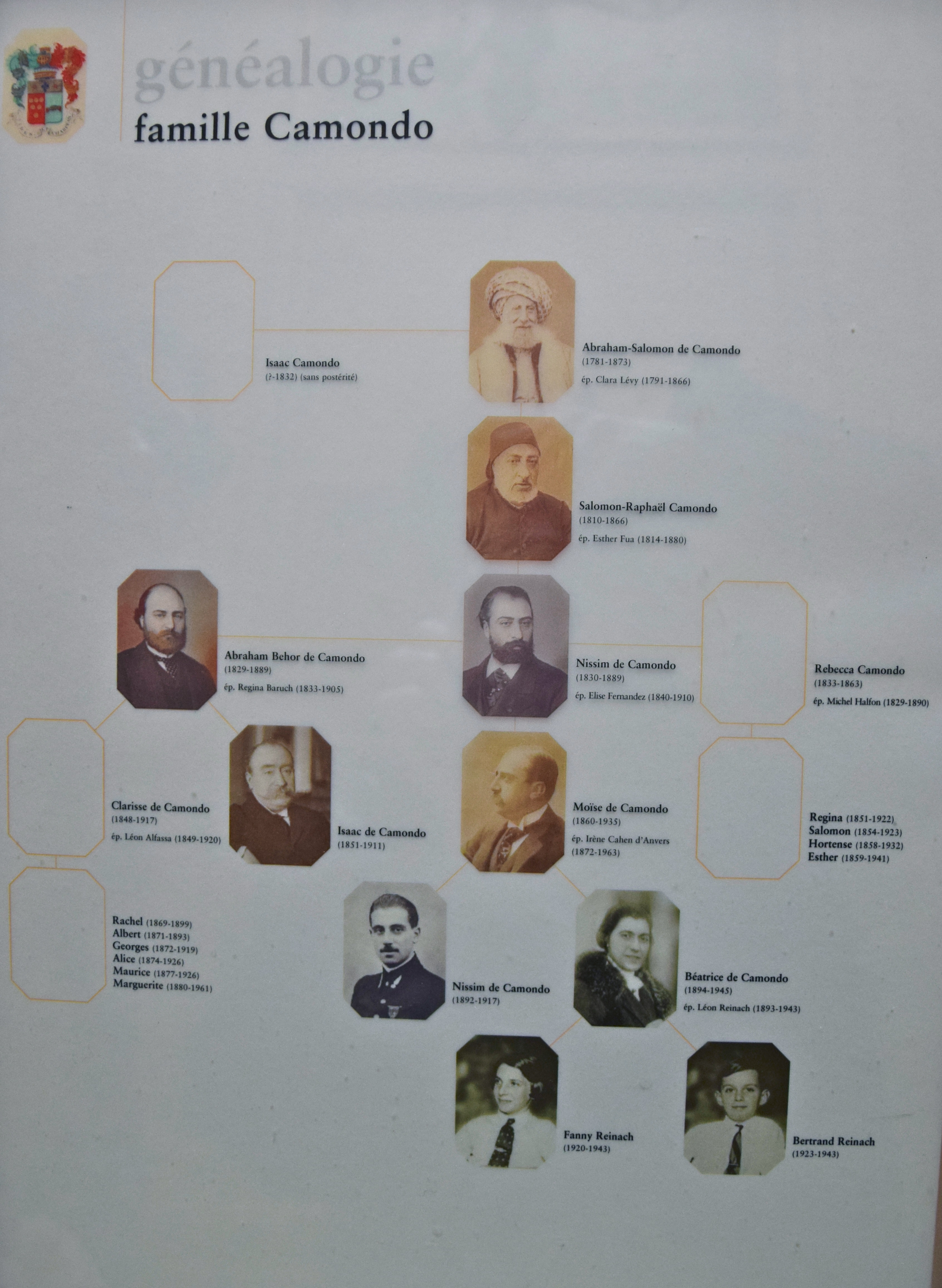 Musée Nissim de Camondo